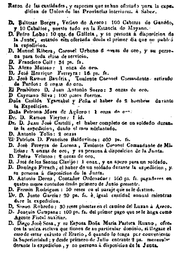 Primera lista de suscriptores al fondo de apoyo para la creación del primer ejército auxiliar a las provincias interiores